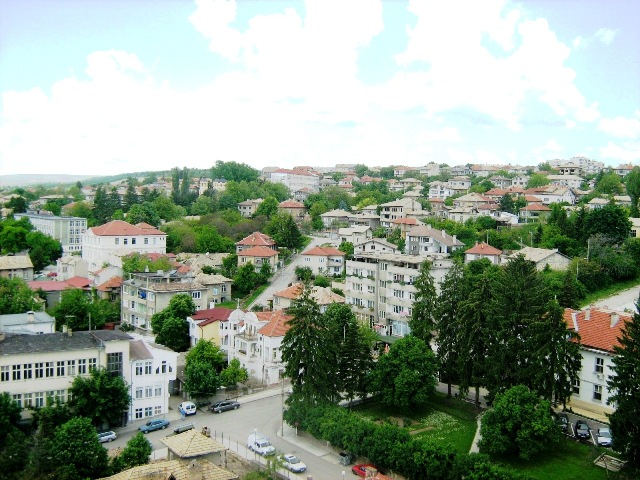 Централната част на град Попово - 12.05.2008 год.; Фото: Вл. Стойков